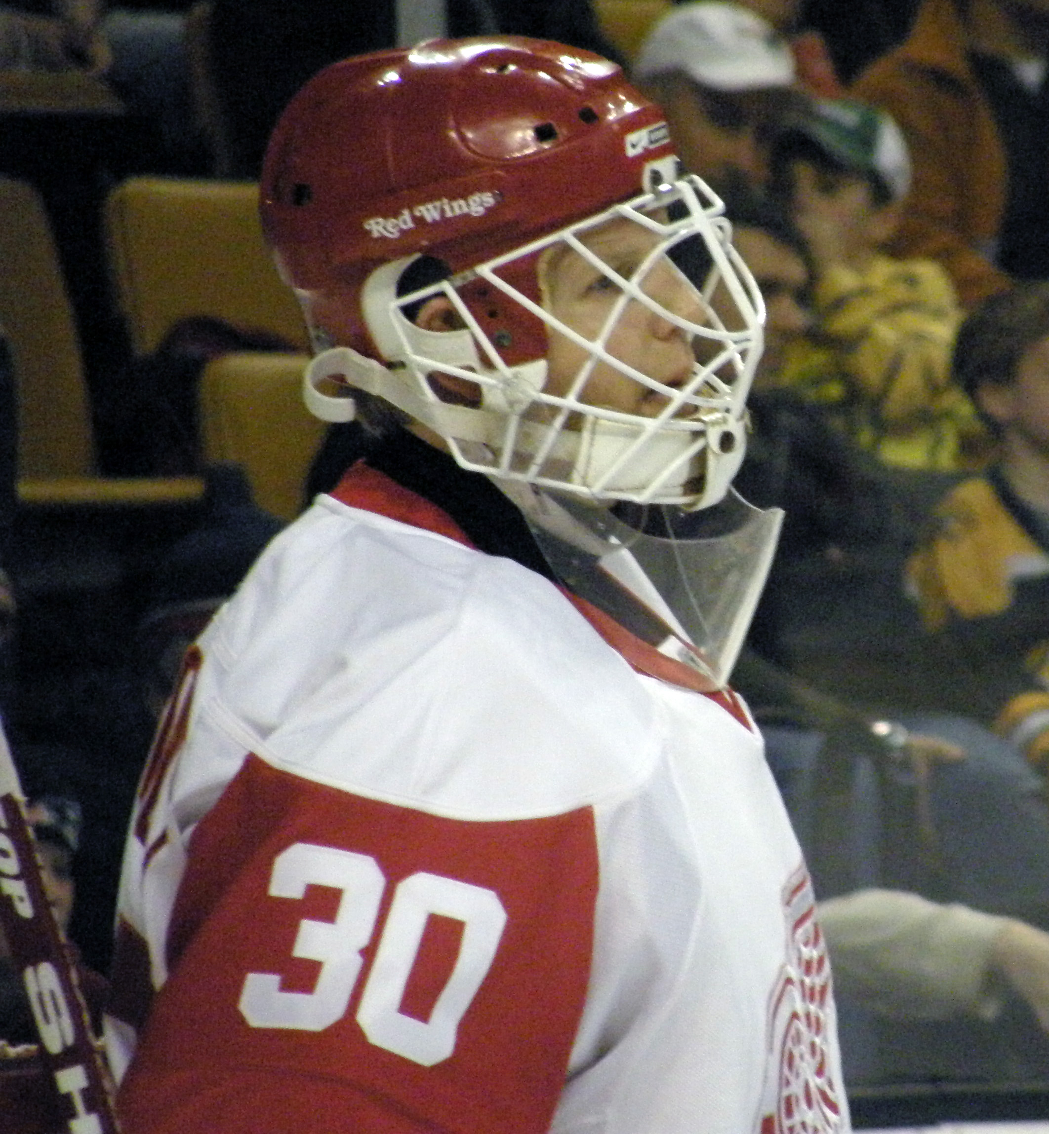 #30 Chris Osgood goaltender der Detroit Red Wings